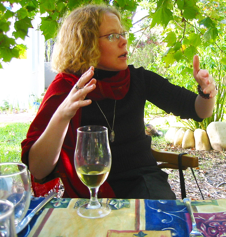 Commentaire après une dégustation de vin de Franschhoek